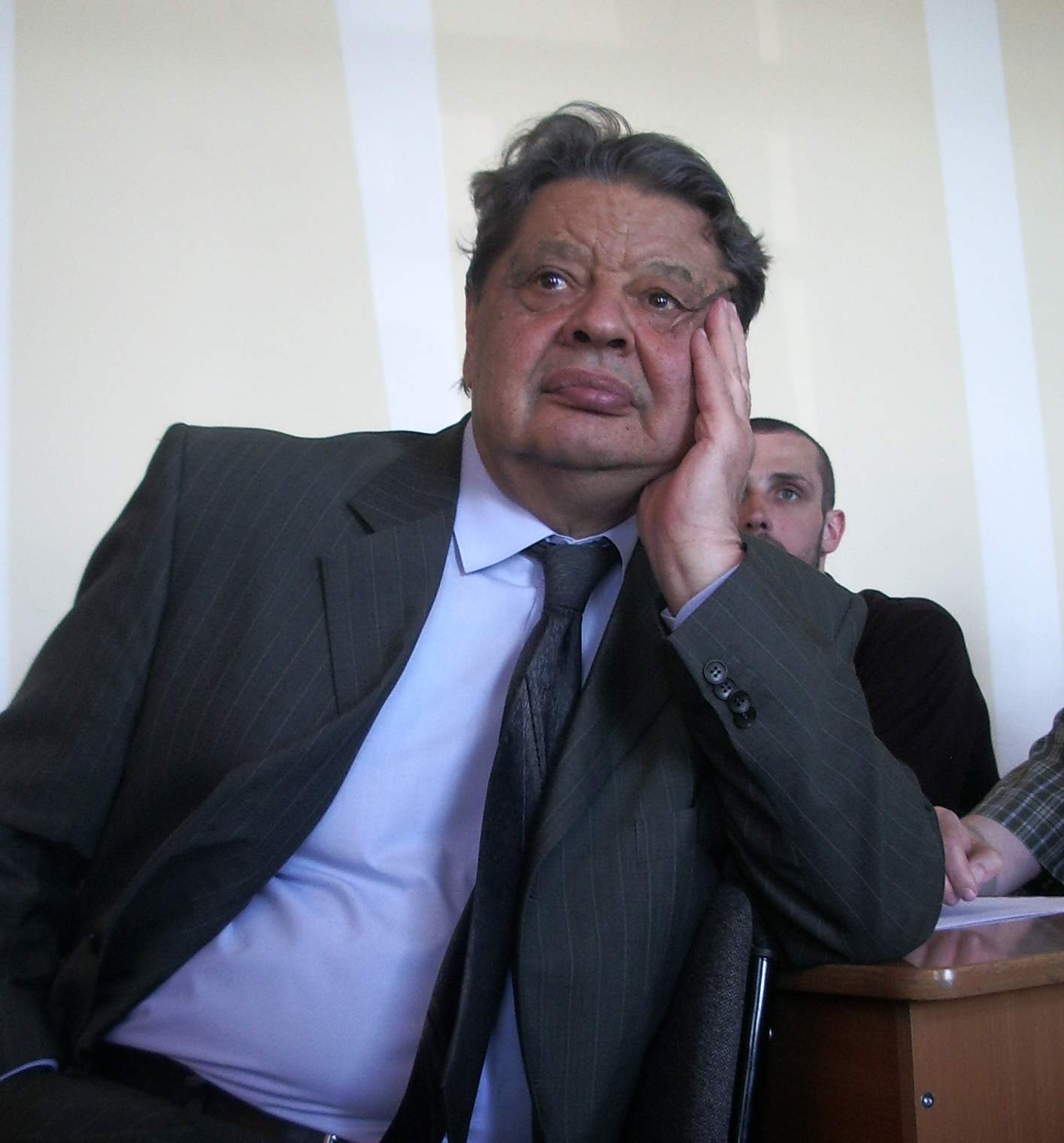 Владимир Петрович Зинченко, фотография сделана 13.06.2006 во время Второй международной конференции по когнитивной науке, Санкт-Петербург